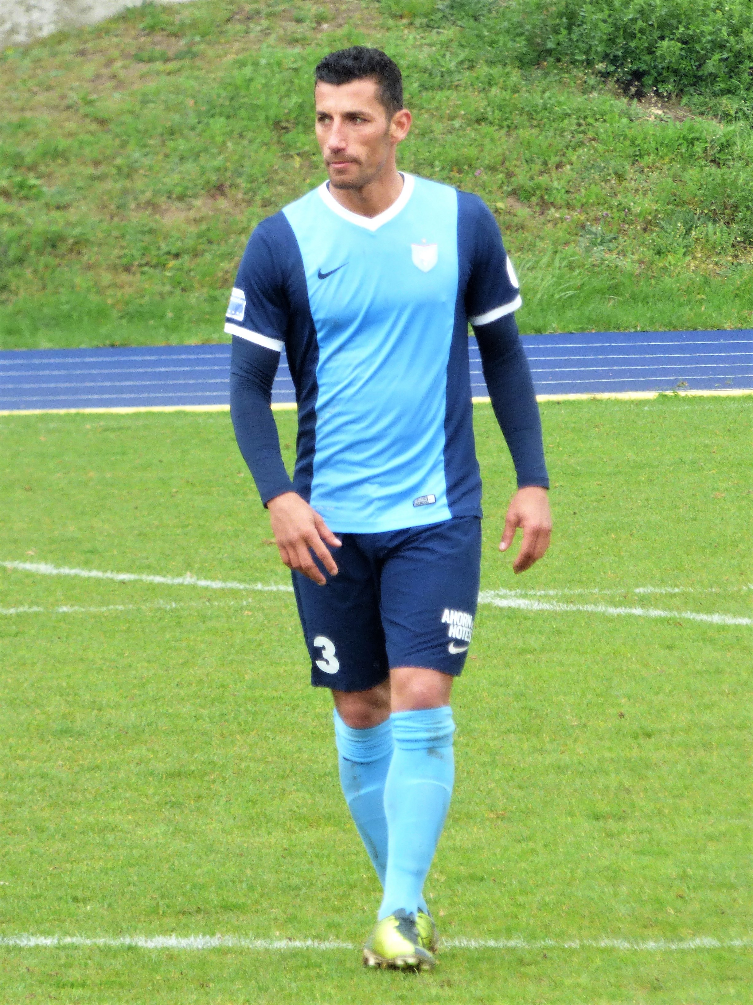 Karim Benyamina im Trikot von Viktoria Berlin